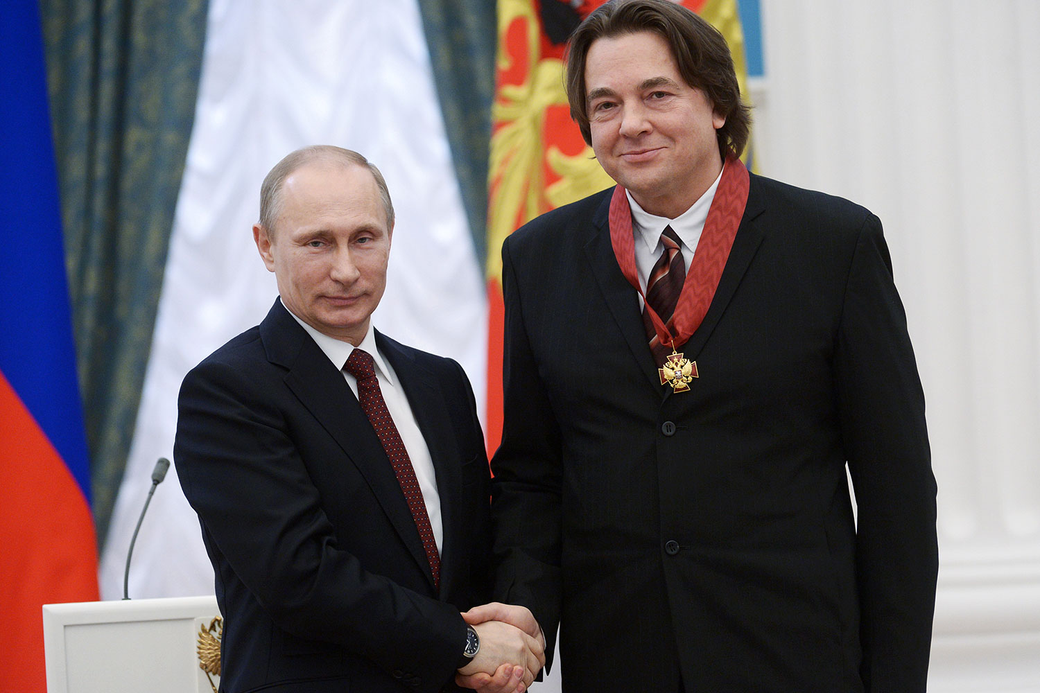 Вручение государственных наград Российской Федерации. Генеральный директор ОАО «Первый канал» Константин Эрнст награждён орденом «За заслуги перед Отечеством» II cтепени.